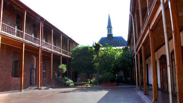 Patio